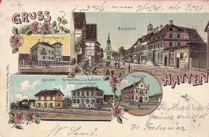 Ansichtskarte mit der Synagoge in Hatten (Bas-Rhin)